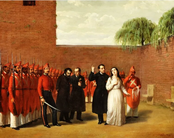 Ejecución de Camila O´Gorman Oleo sobre tela. Mide 49 x 63 cm. Firmado F. Augero y fechado Turin 1858 abajo a la derecha.